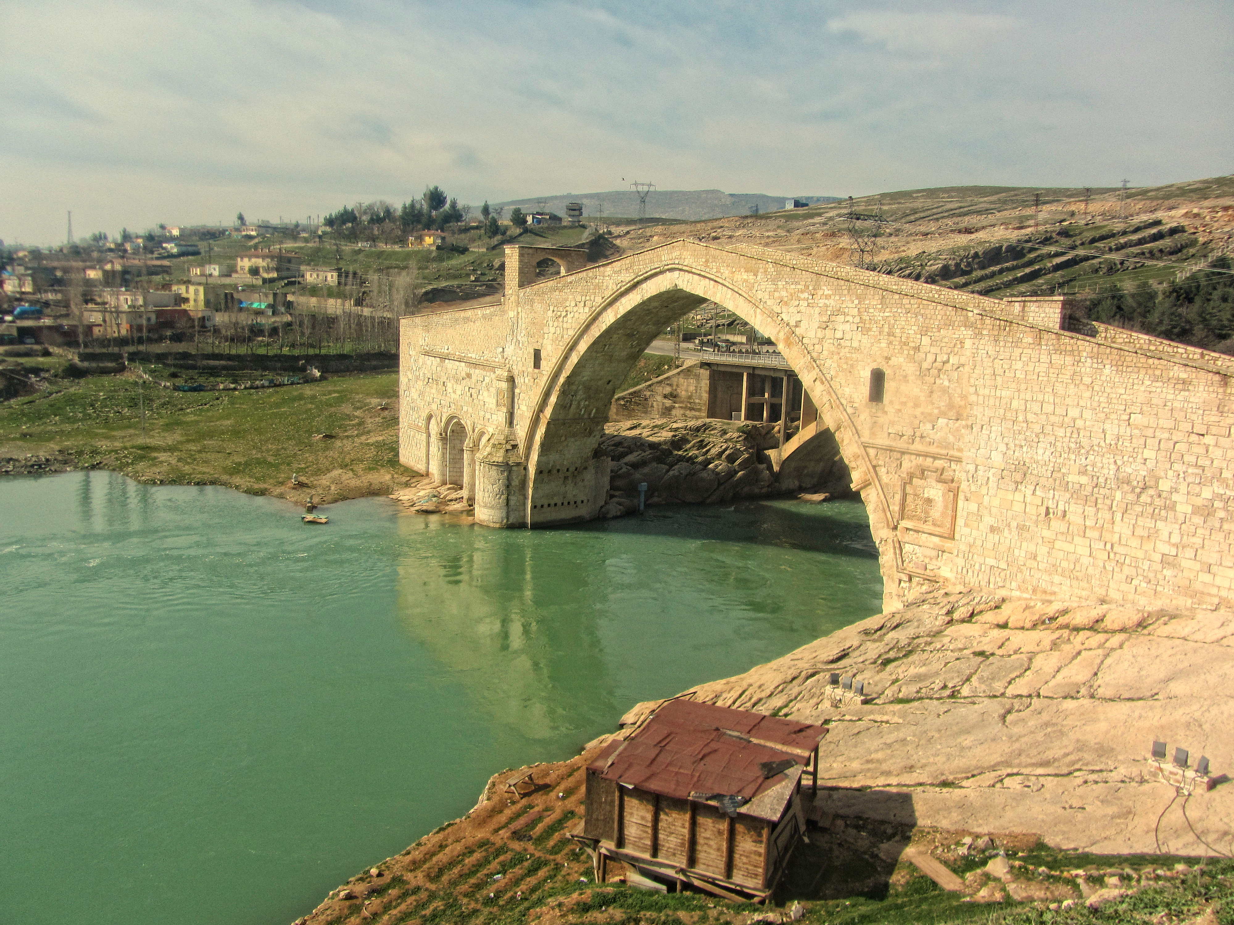 Tarihi Malabadi köprüsünün yakın zamanlarda çekilmiş bir fotoğrafı.